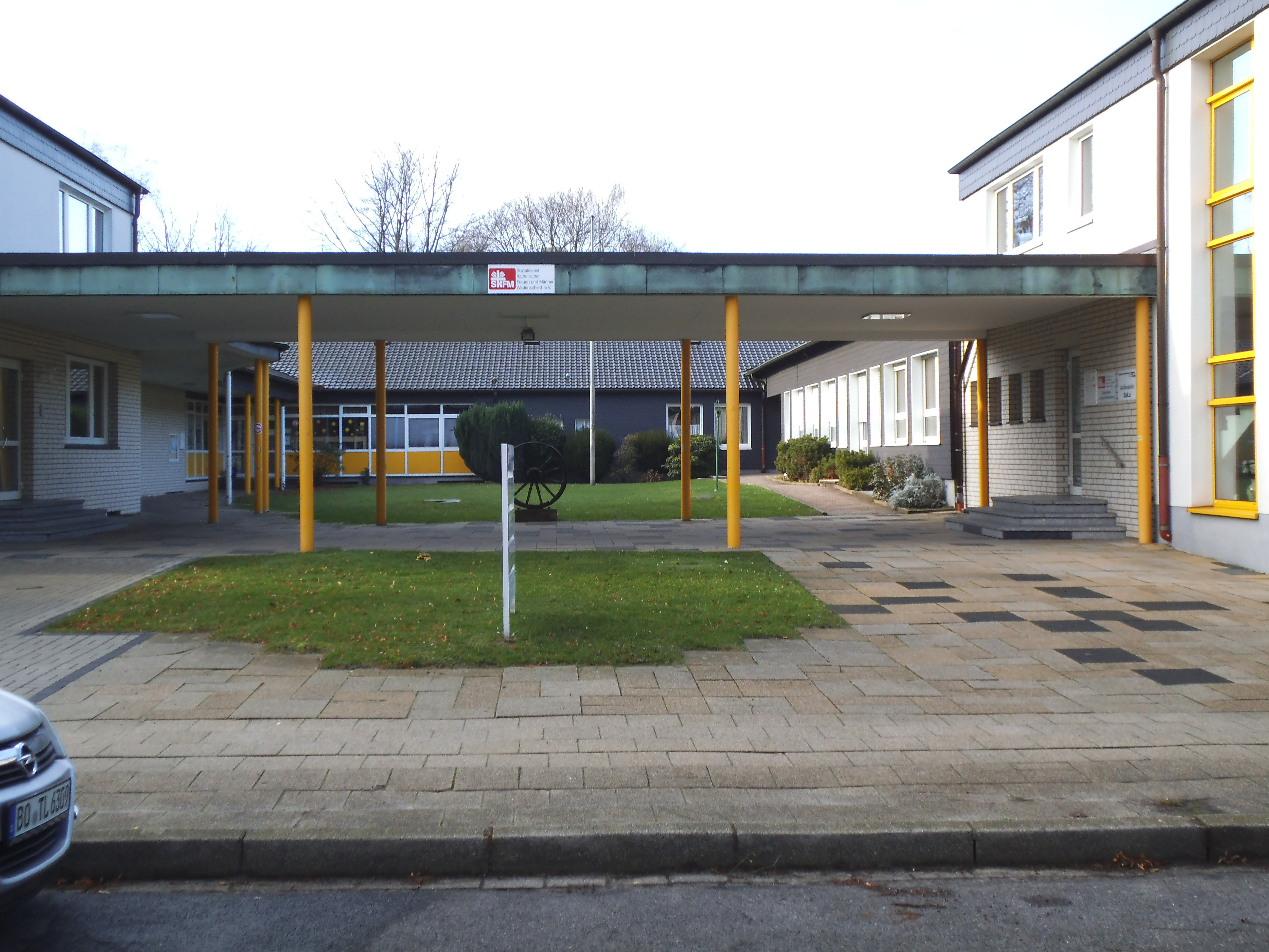 Begegnungsstätte St. Pius in Bochum-Wattenscheid, Stresemannstr. 11-13. Vereinsheim des Schachvereins SV Wattenscheid.